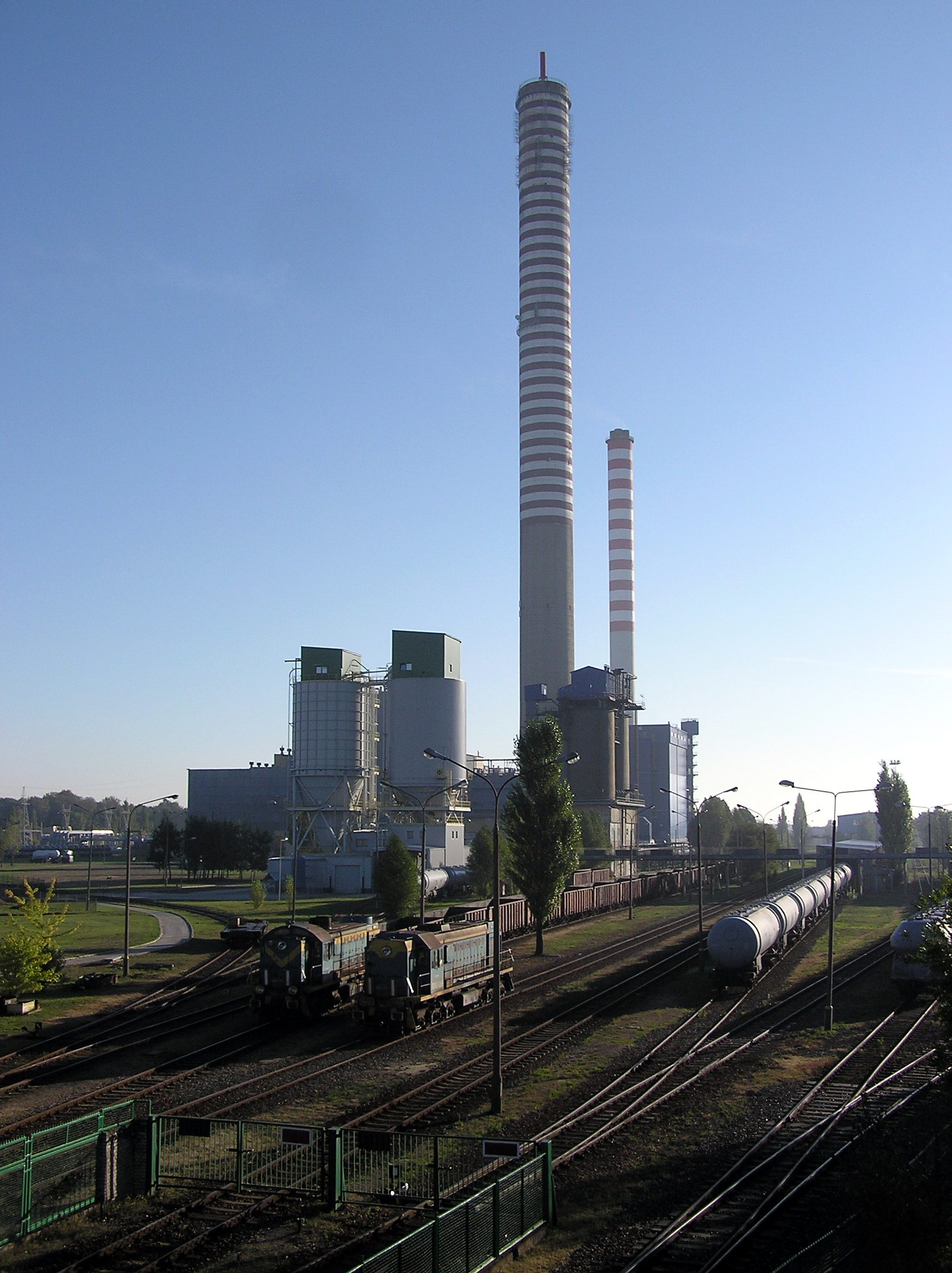 EC4 w Łodzi, ver 2.